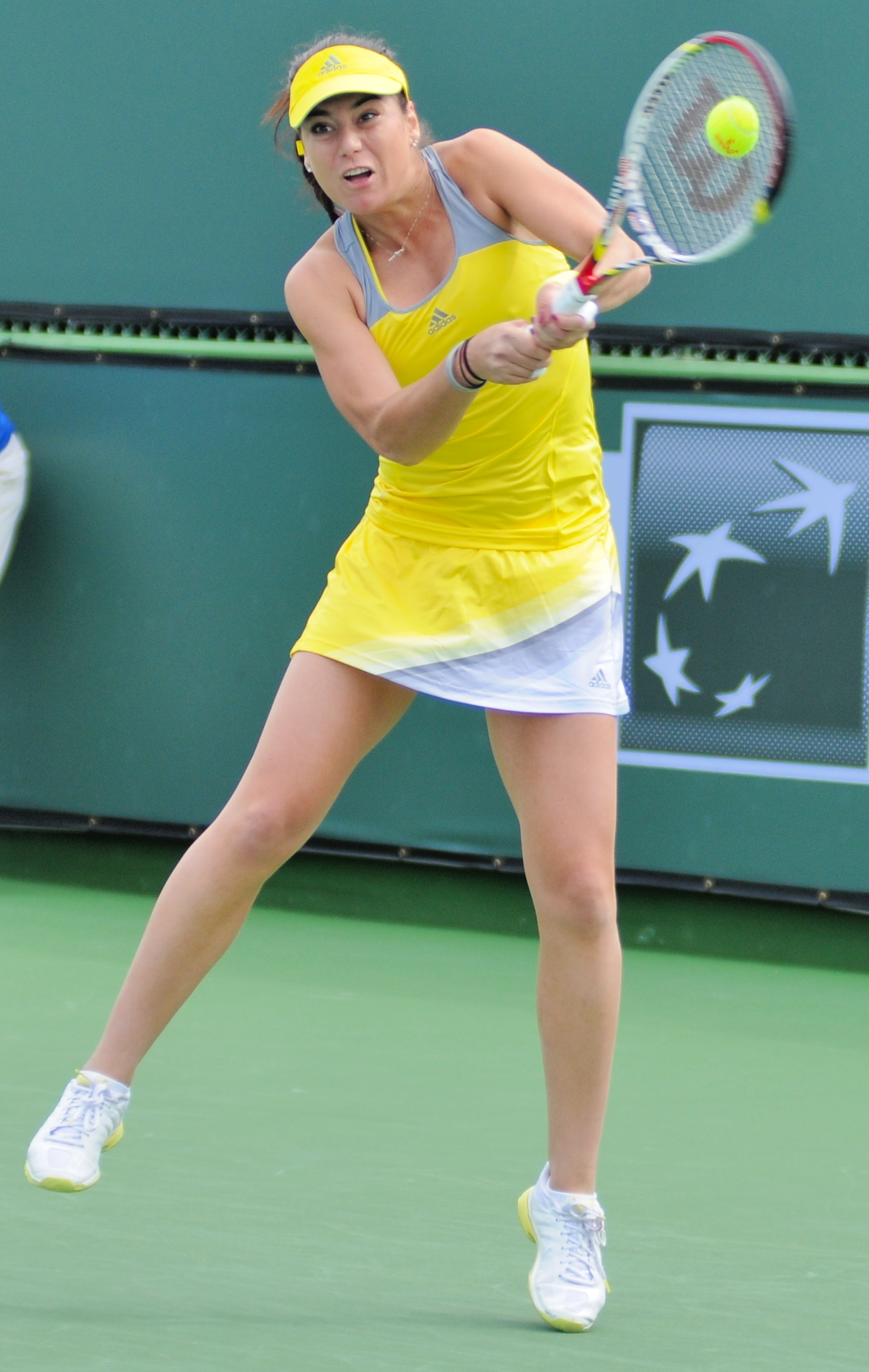 BNP Paribas Open 2013